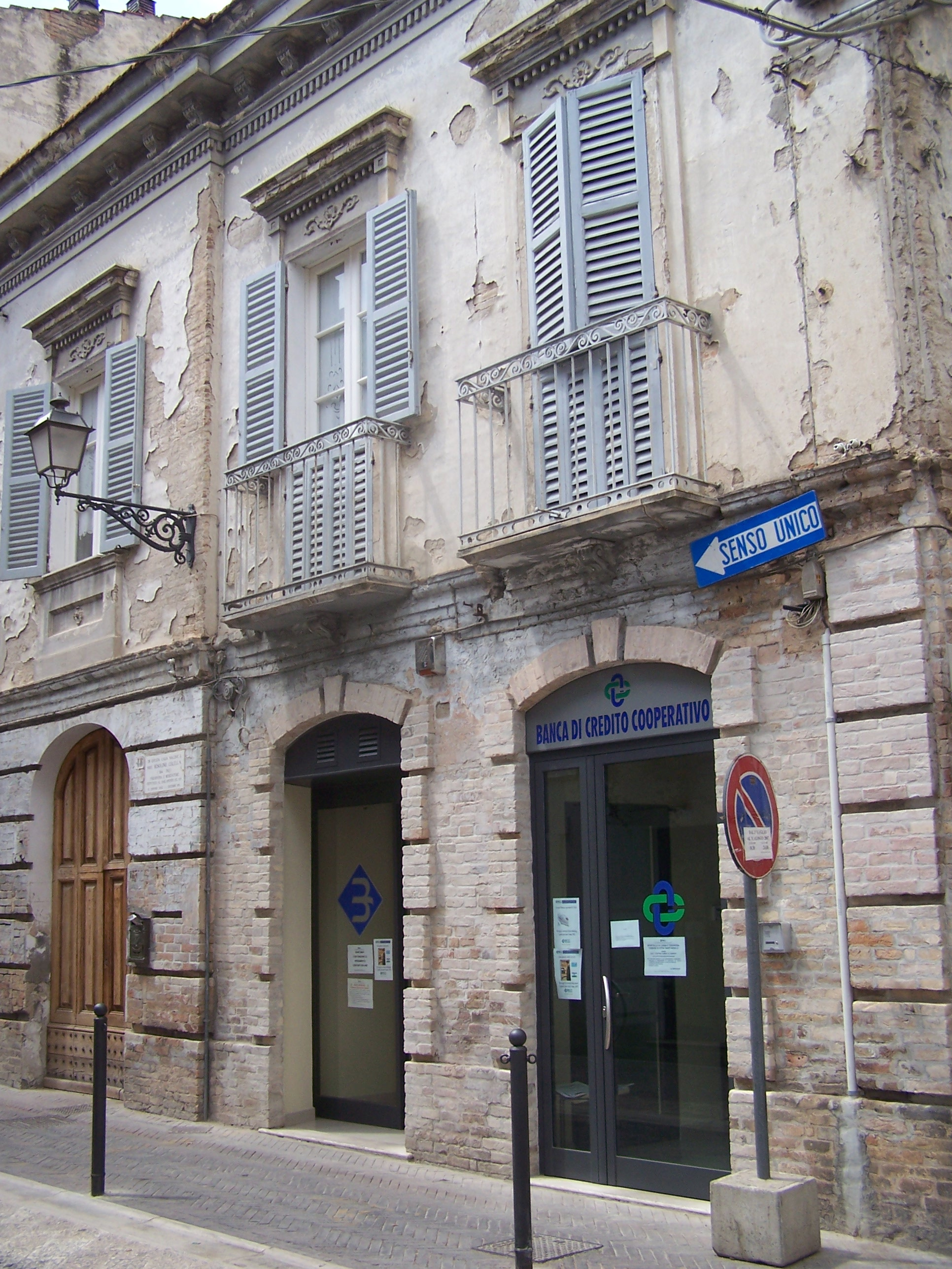 Città Sant'Angelo (PE), Palazzo Colella